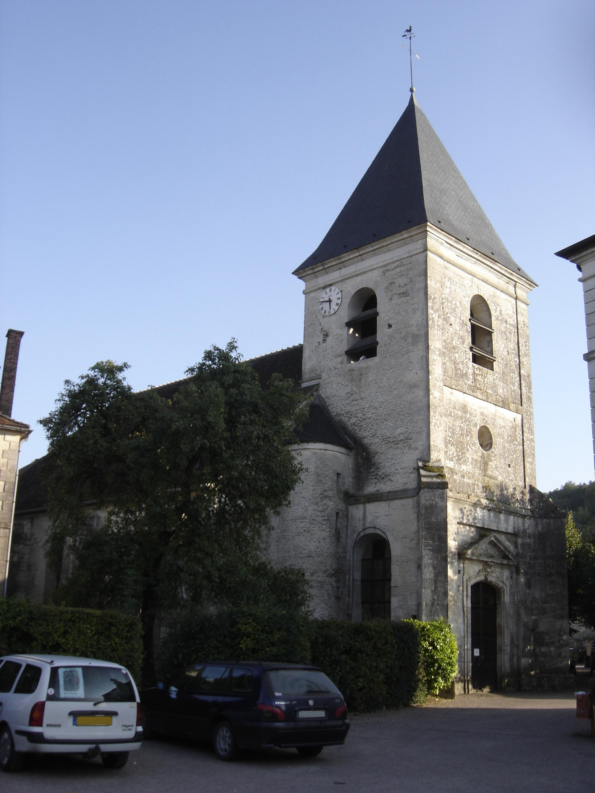 Église Saint Martin de Couvignon (Aube, France)